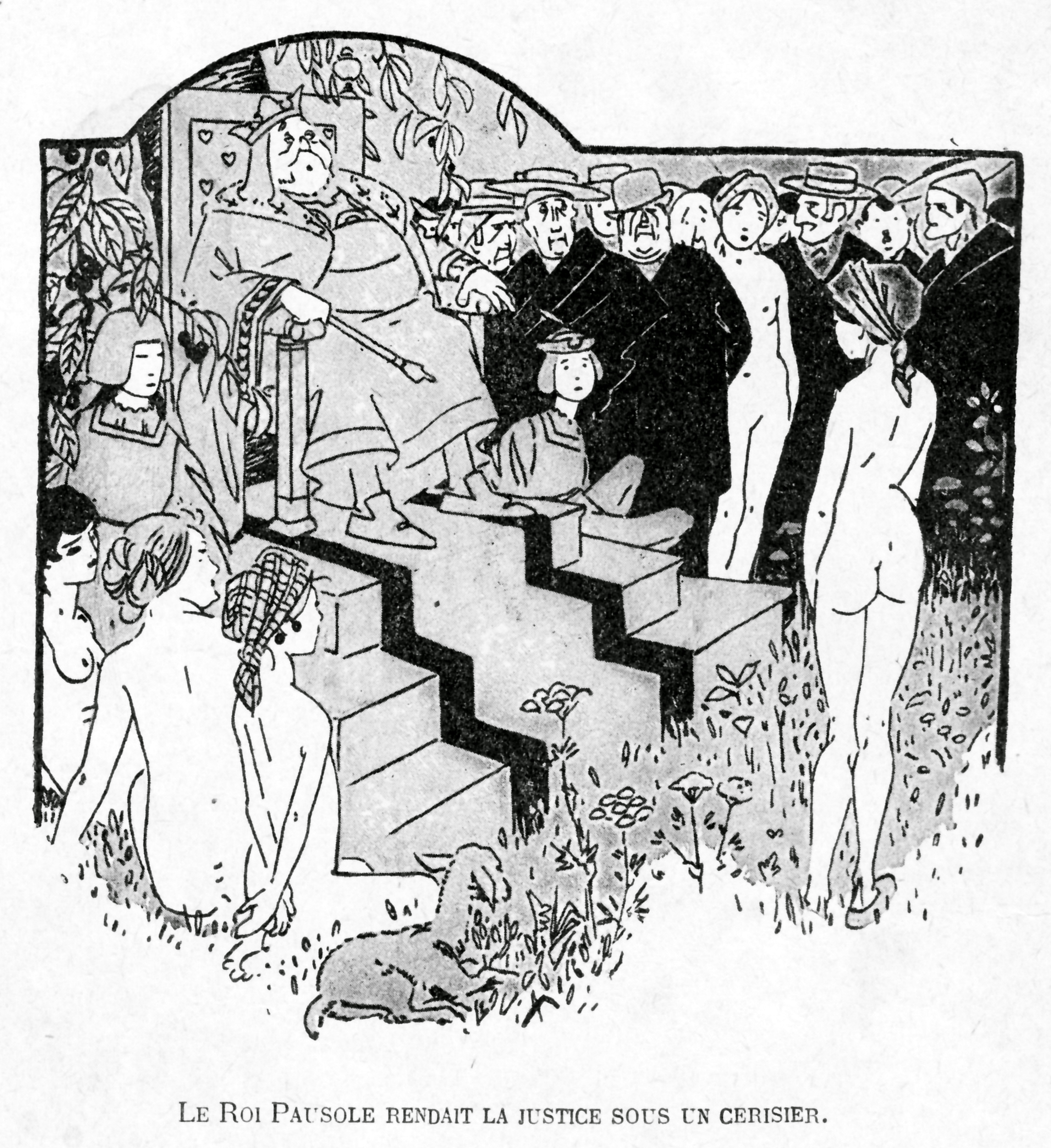 Pierre Louÿs : Les Aventures du roi Pausole (illustrations d'après les aquarelles de Carlègle) Paris, Modern-bibliothèque. Arthème Fayard et Cie, éditeurs Le roi Pausole rendait la justice sous un cerisier